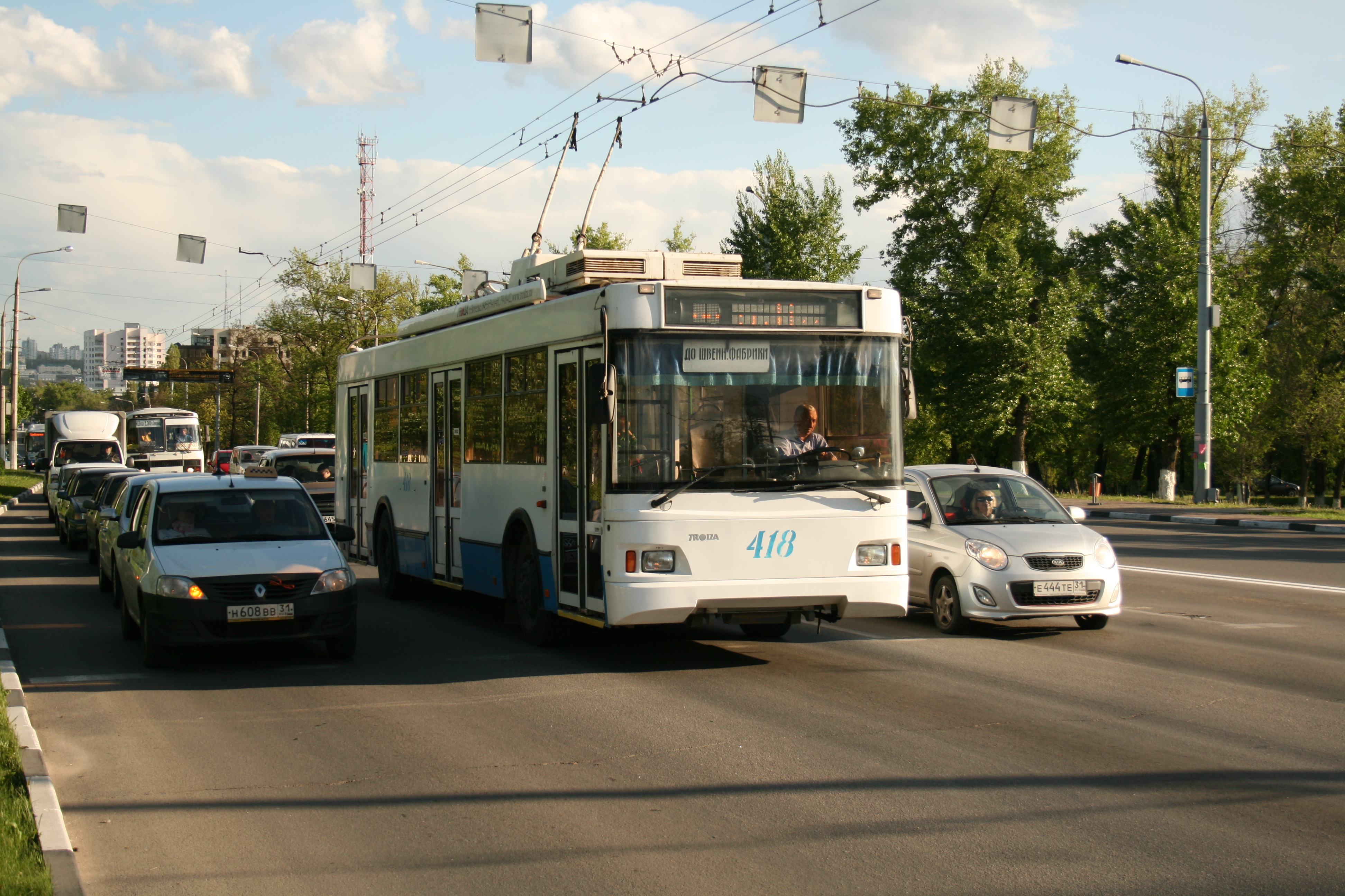 Белгородский троллейбус на проспекте Б. Хмельницкого